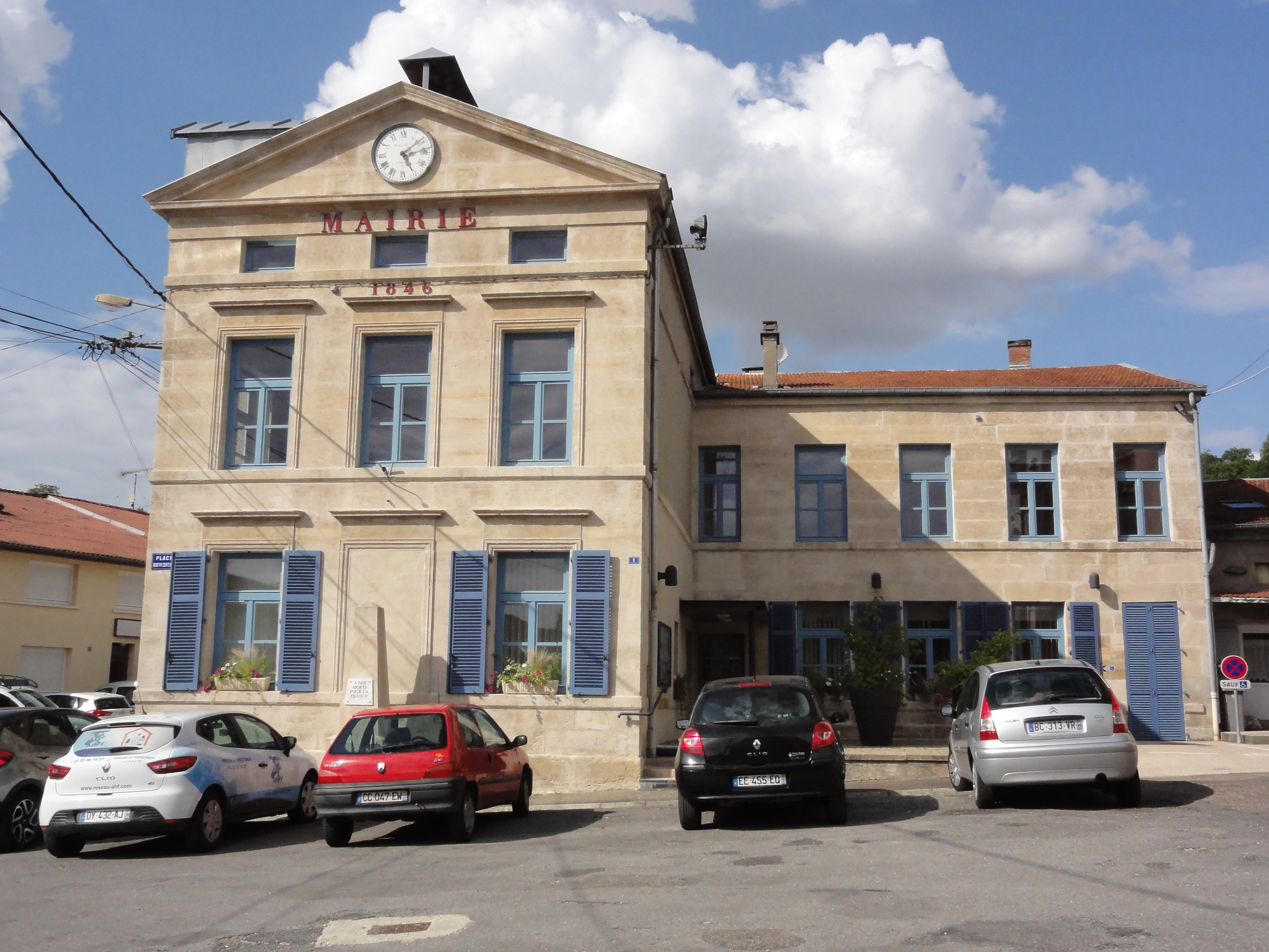 Resson (Meuse) mairie